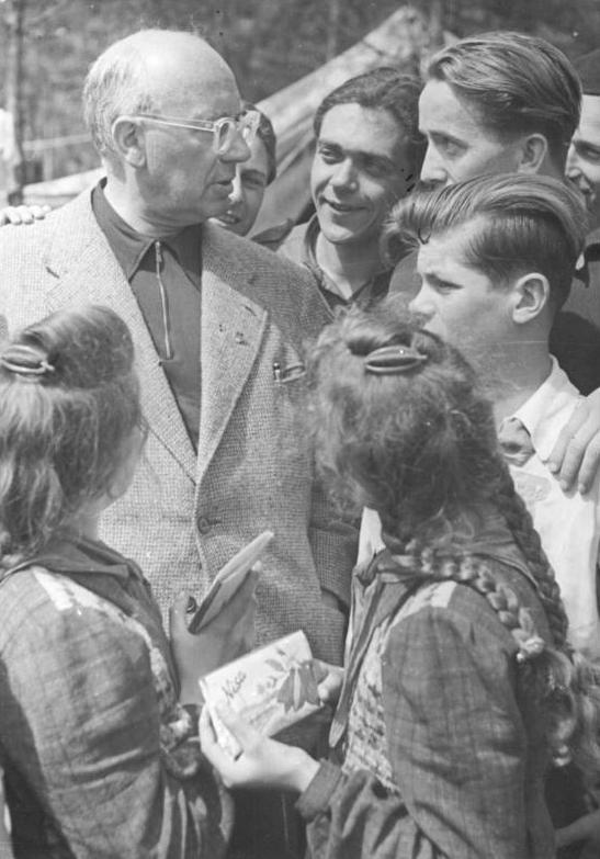 ADN-ZB Donath-Sei-Schm-III.Weltfestspiele der Jugend und Studenten in Berlin 1951 UBz: Johannes R.Becher im Gespräch mit Jungen Pionieren im Zeltlager der Pionierrepublik "Ernst Thälmann" in der Wuhlheide.4.8.1951